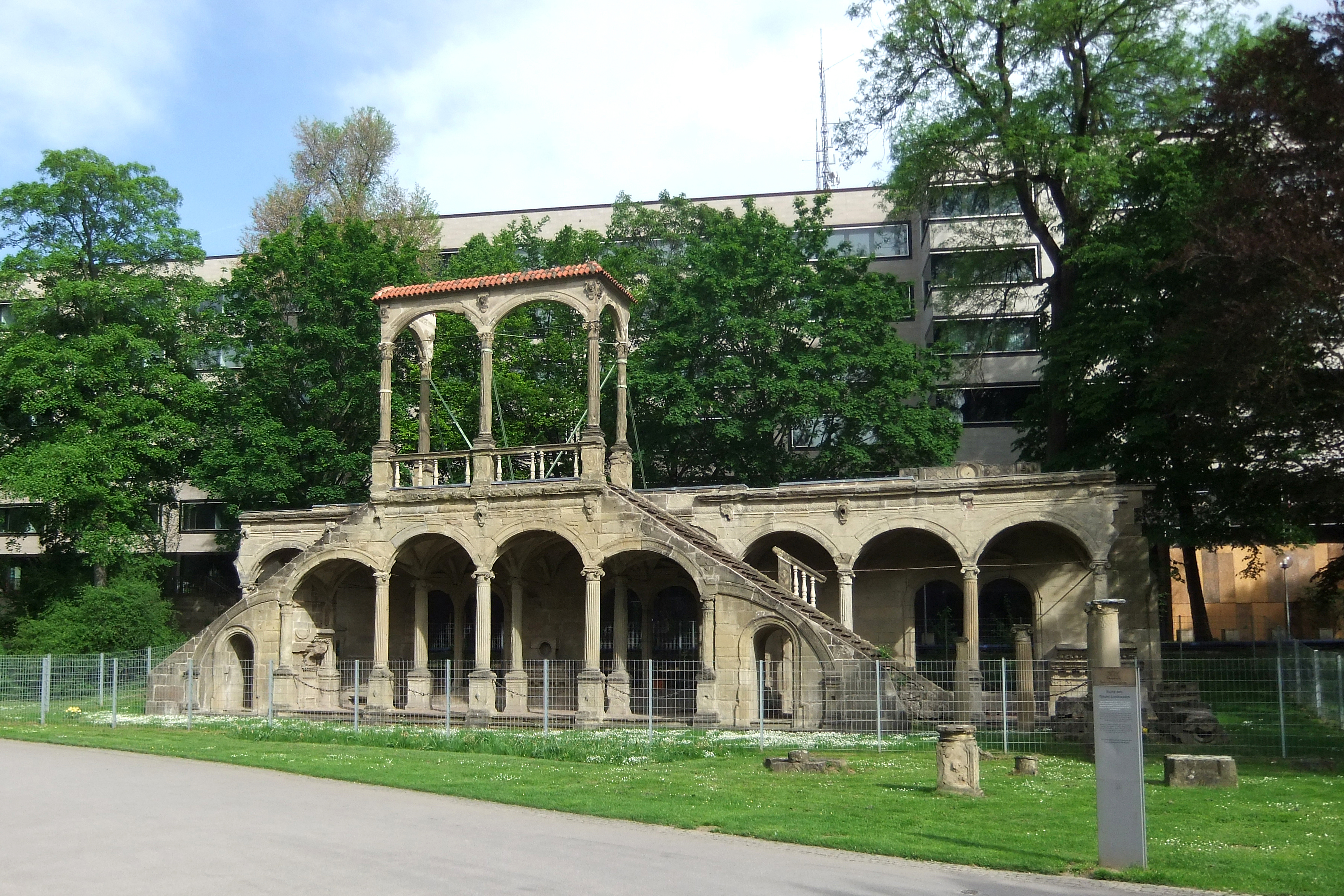 Ruine des Neuen Lusthauses in Stuttart im Mittleren Schlossgarten